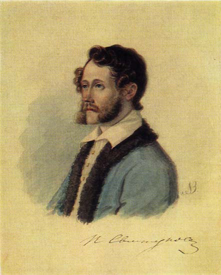 Свистунов Петр Николаевич- декабрис